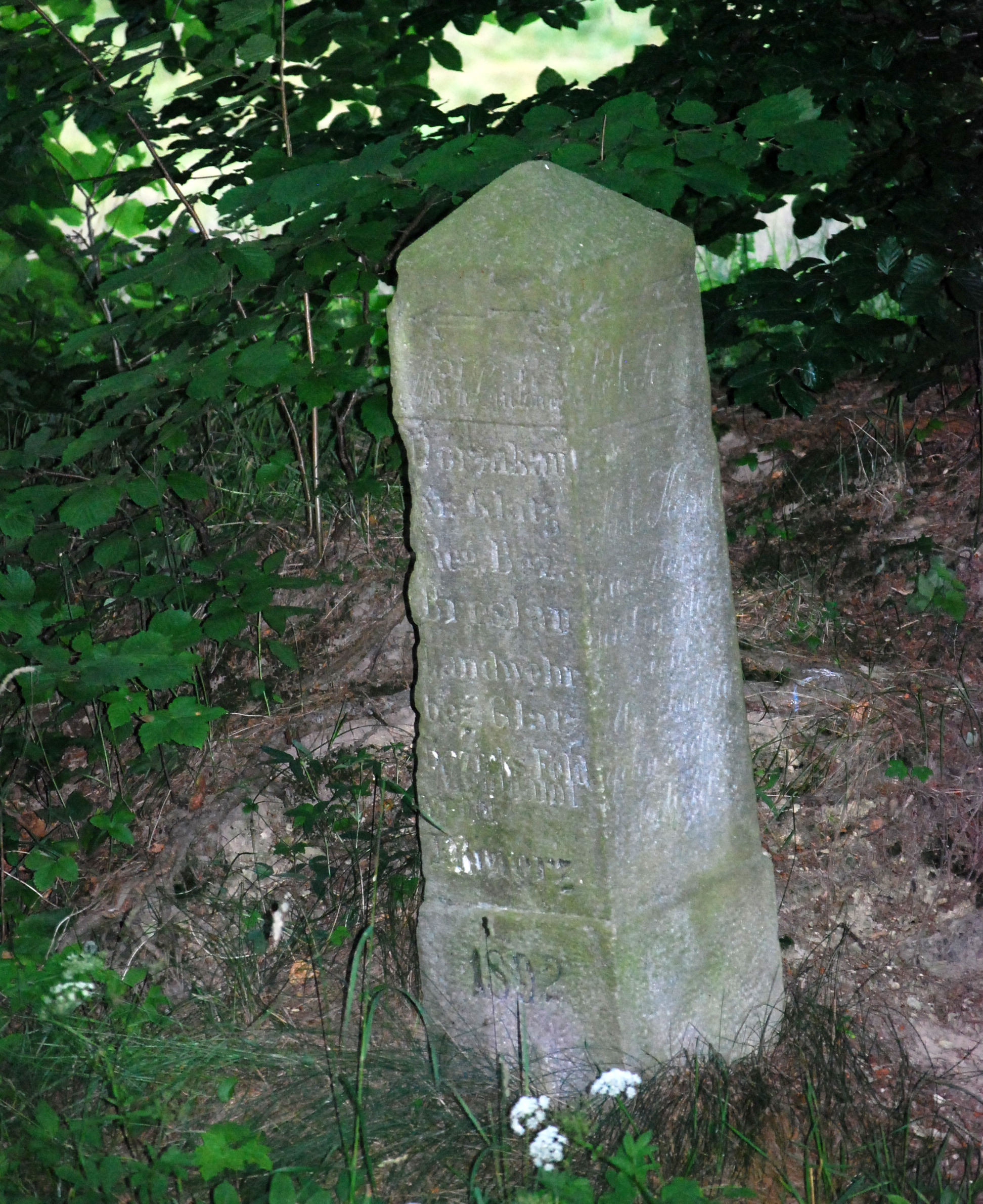 Kamienny drogowskaz z 1802 r. we wsi Darnków (gmina Lewin Kłodzki, woj. dolnośląskie)